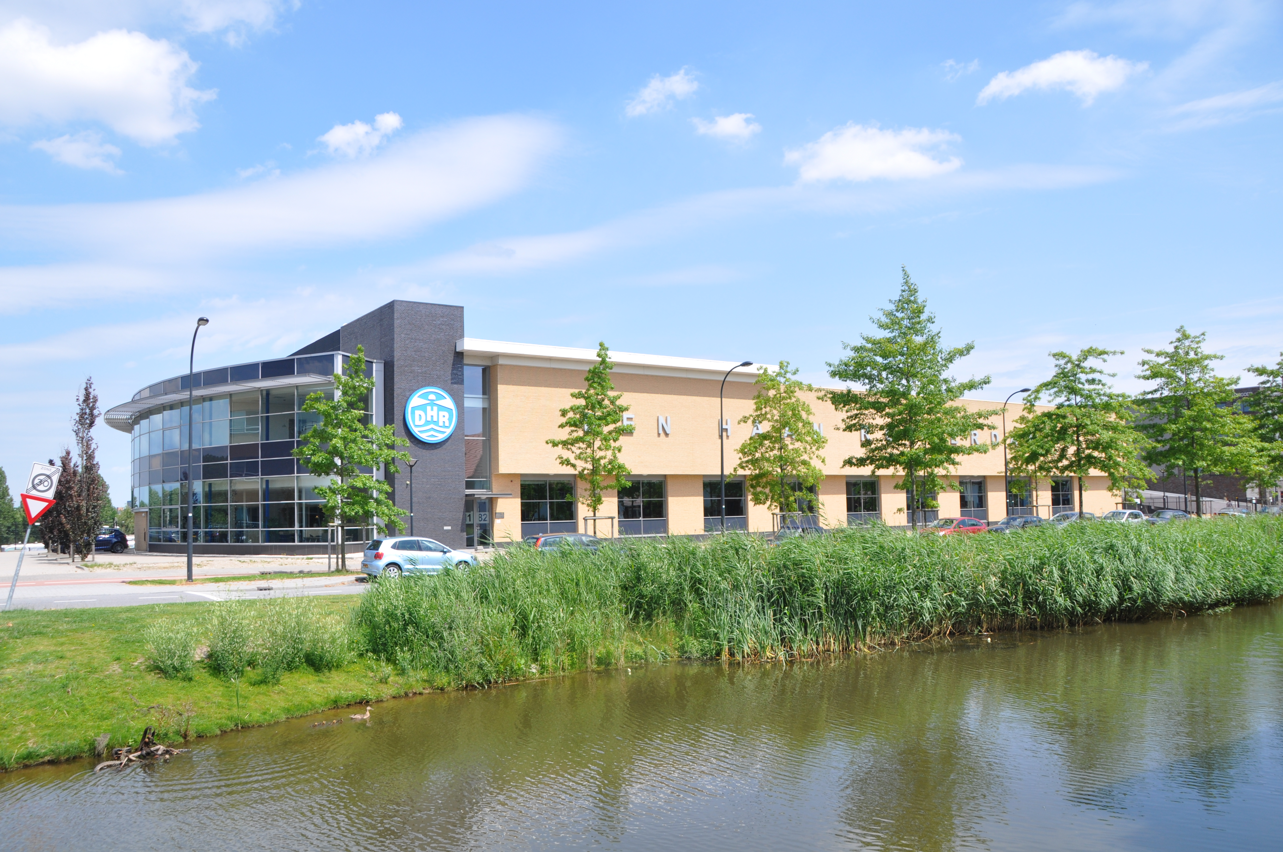 DHR Den Haan Rotterdam (maar in Capelle)